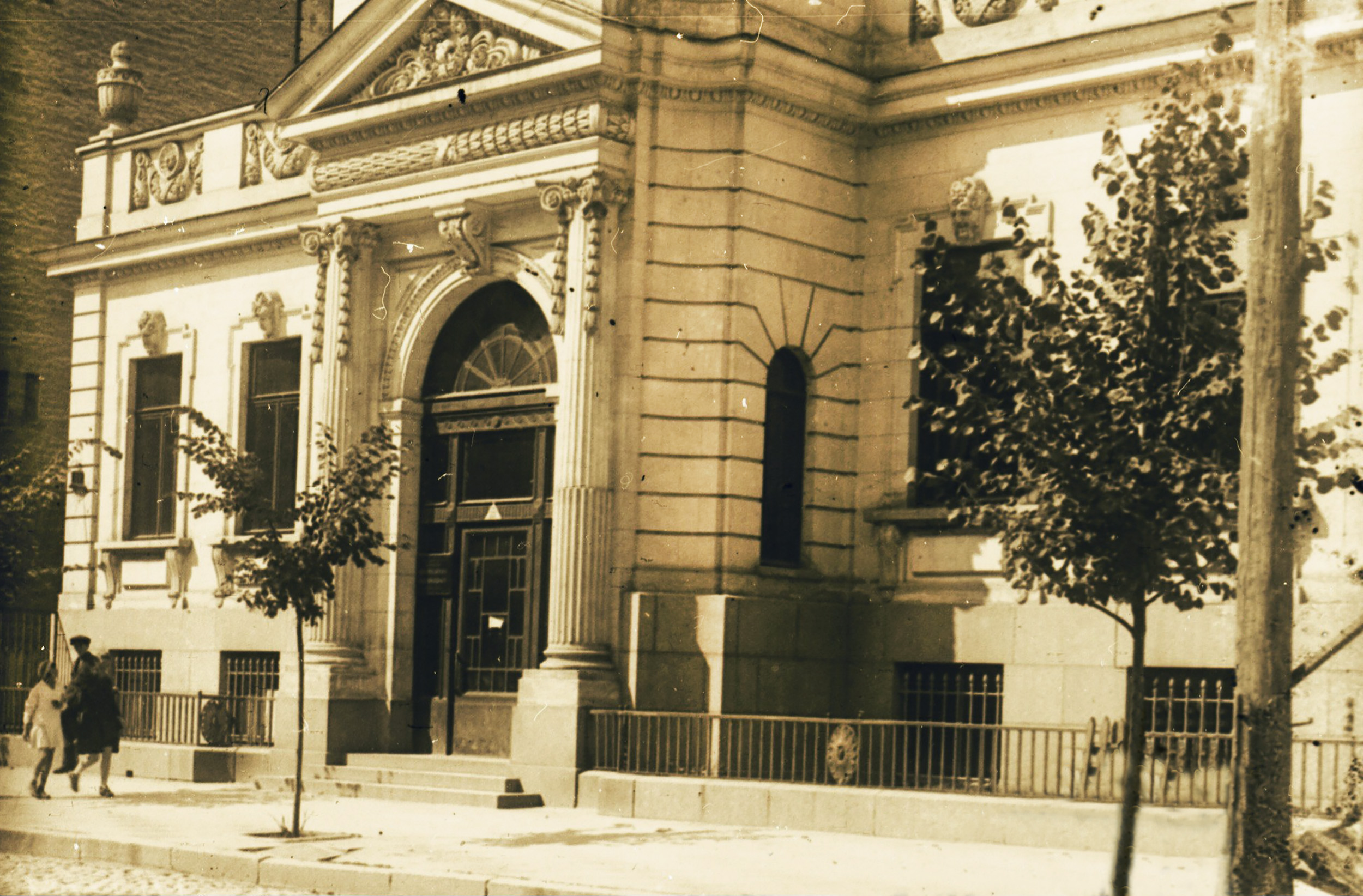 Особняк, в якому у 1919 р. розміщувався Всеукраїнський комітет охорони пам'яток мистецтва та старовини, Київ, Шовковична вул., 14